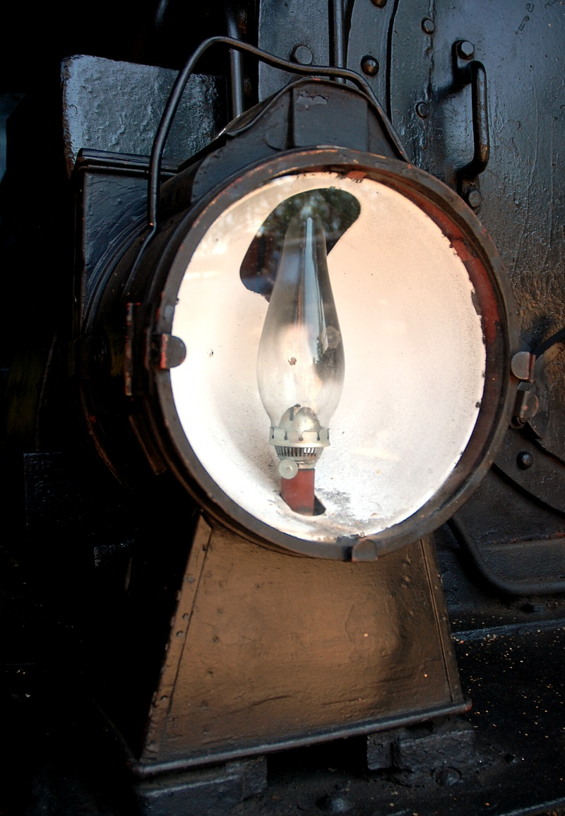 Petrolejová lampa na parní lokomotivě